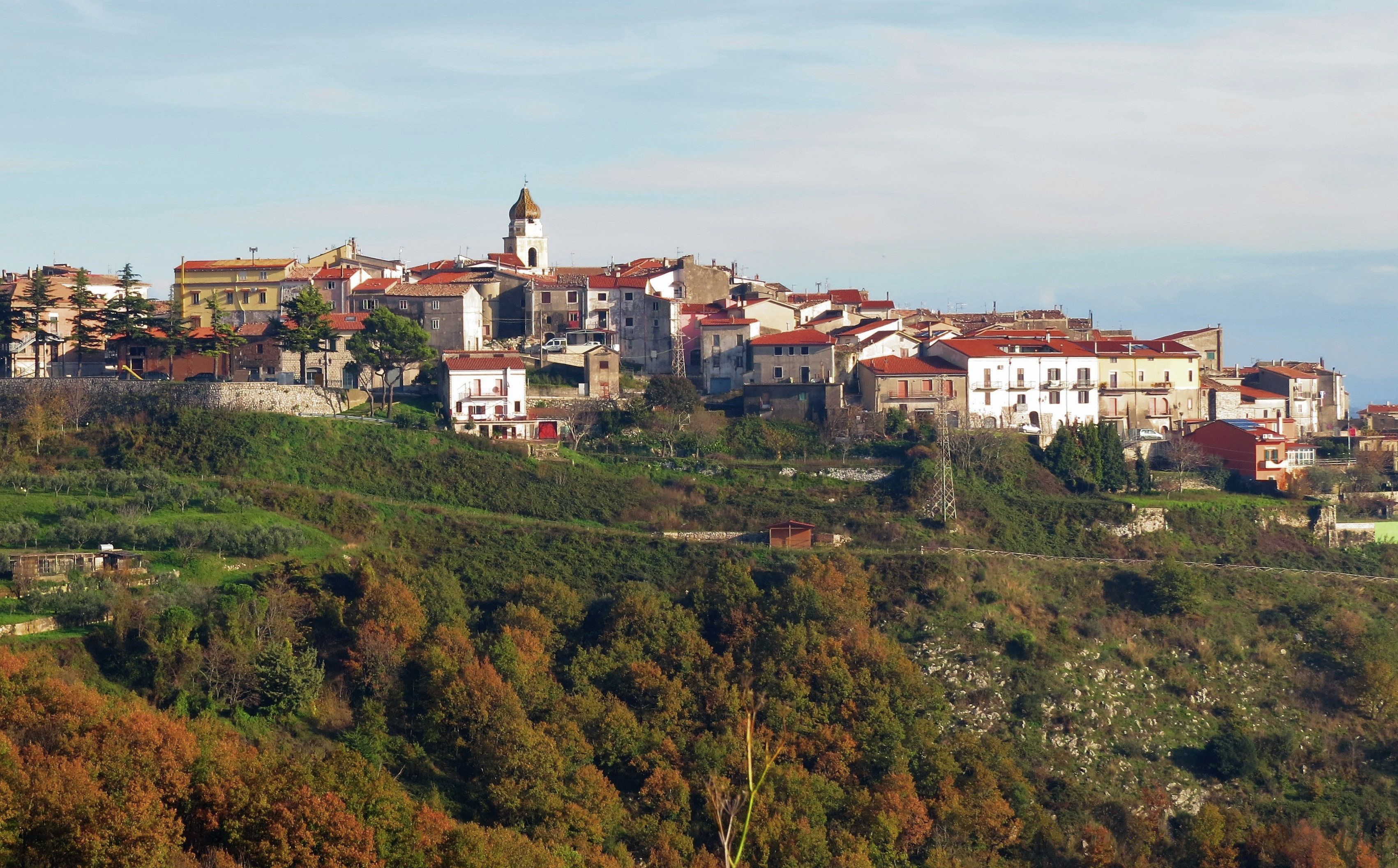 Veduta dell'abitato di San Lupo (BN)